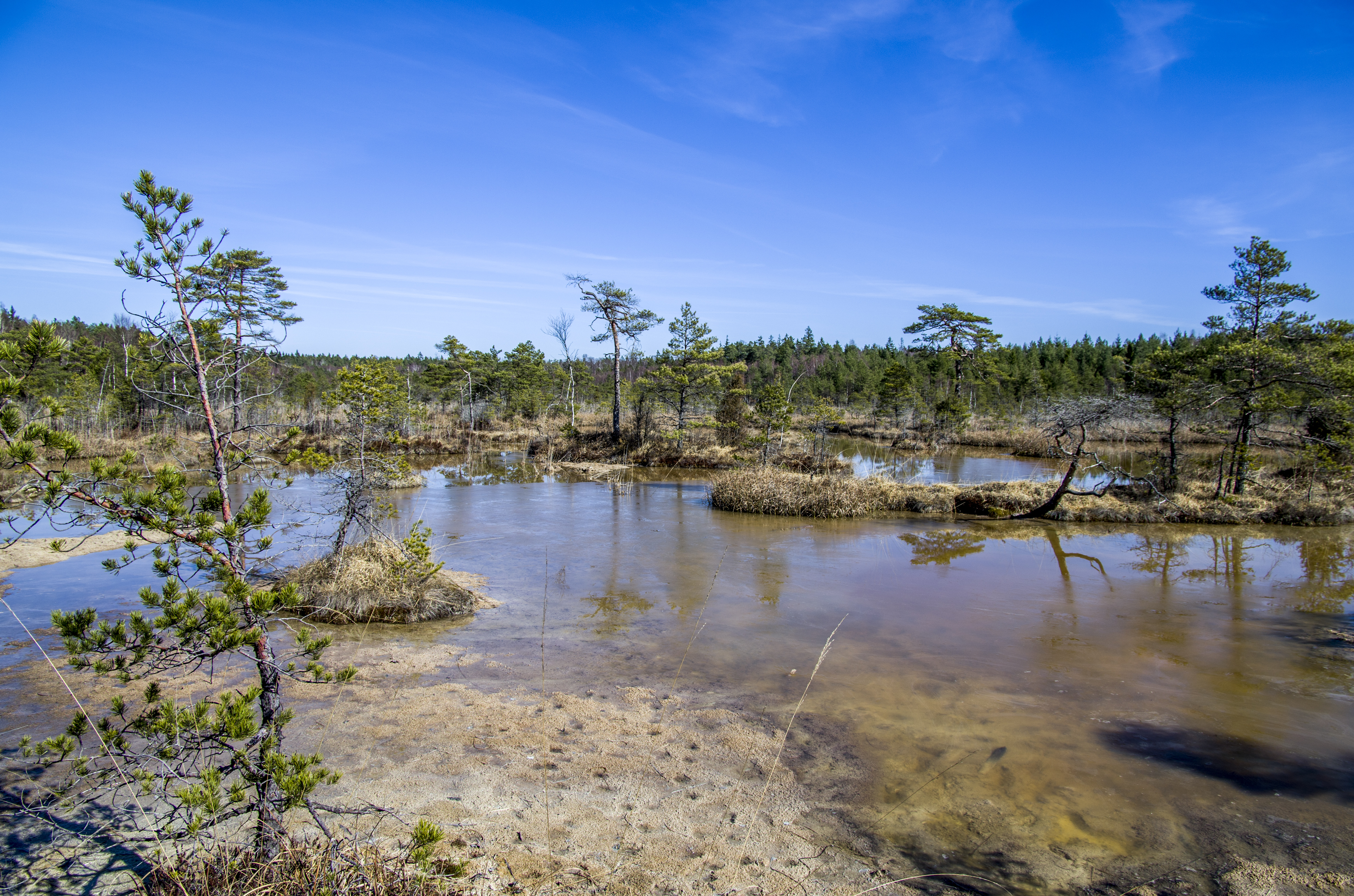 sulfur lakes- sēra dīķi